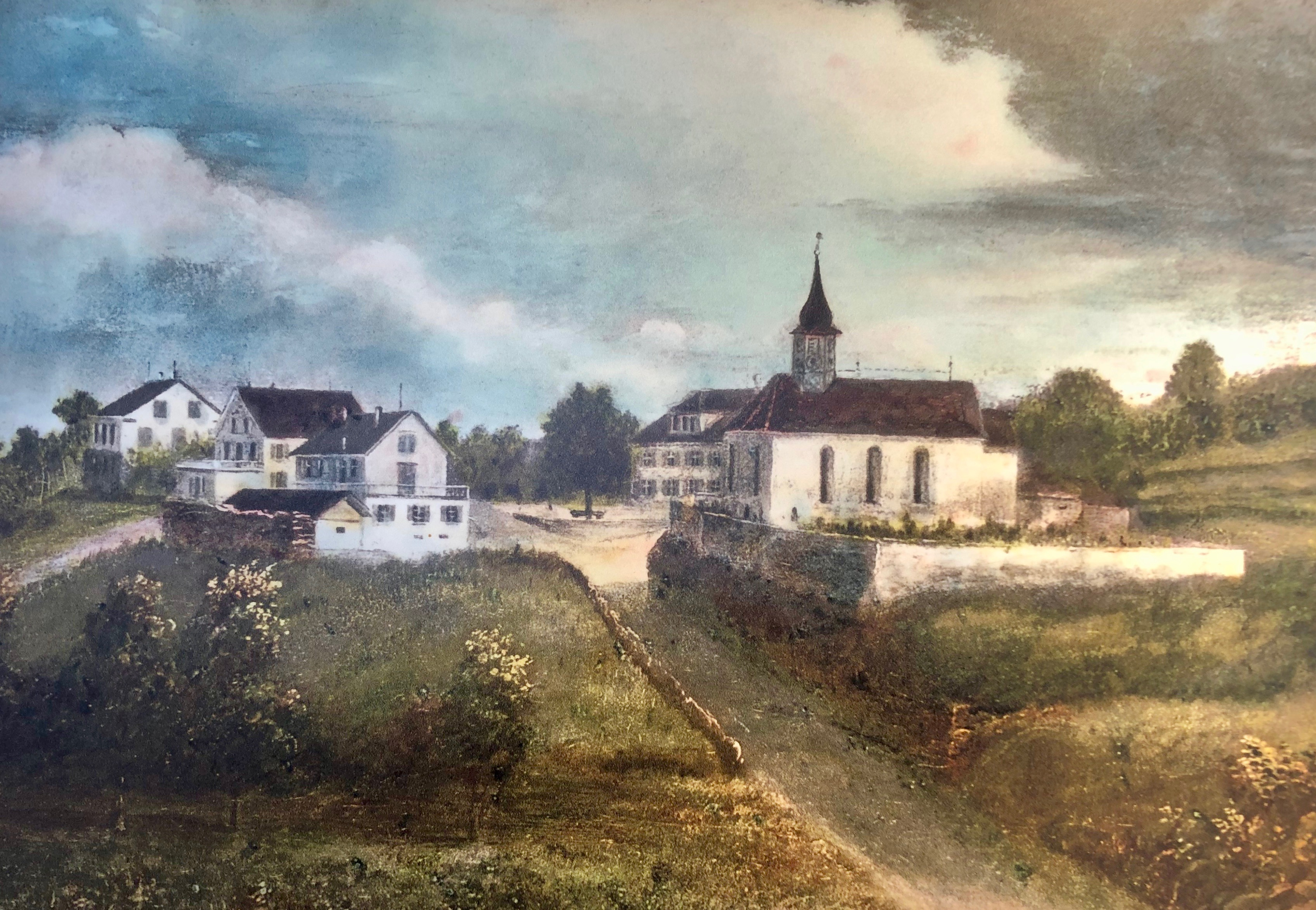 Wollishofen um 1830